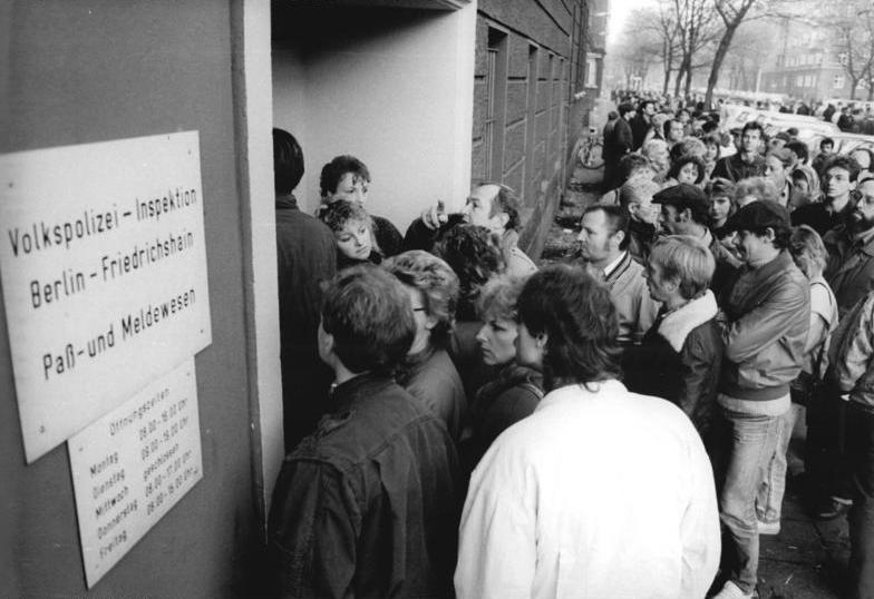 ADN-ZB-Settnik-10.11.1989-Berlin: Paß- und Visaerteilung-Unkompliziert und kurzfristig werden nach Inkrafttreten der neuen Reiseregelung auf den Dienststellen des Paß- und Meldewesens der Hauptstadt - hier in der Friedrichshainer Marchlewskistraße - die Anträge der Bürger auf Paßausstellung und Visaerteilung bearbeitet.